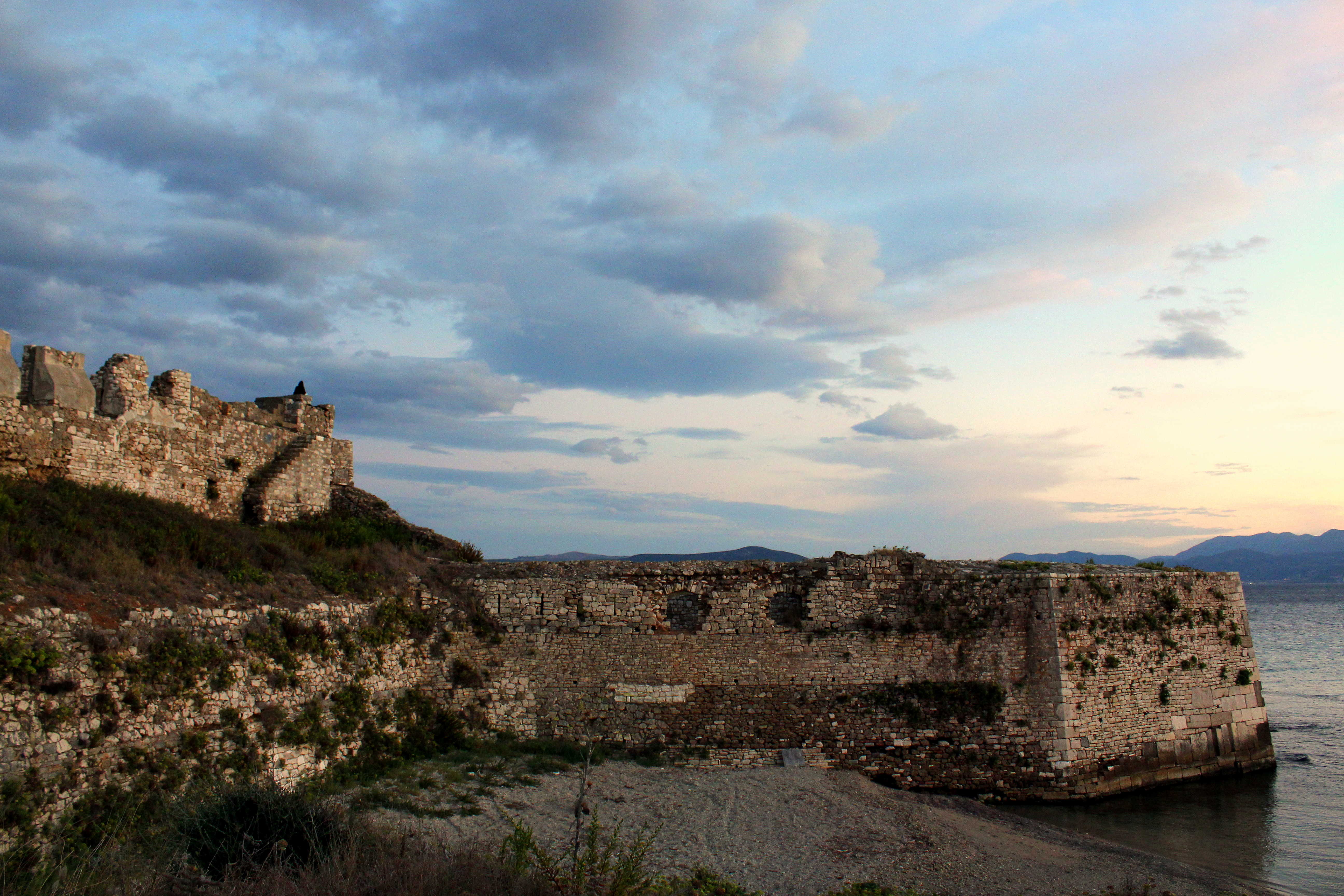 Κάστρο Παντοκράτορος, Πρέβεζα«Κάστρο Παντοκράτορος - Πρέβεζα»